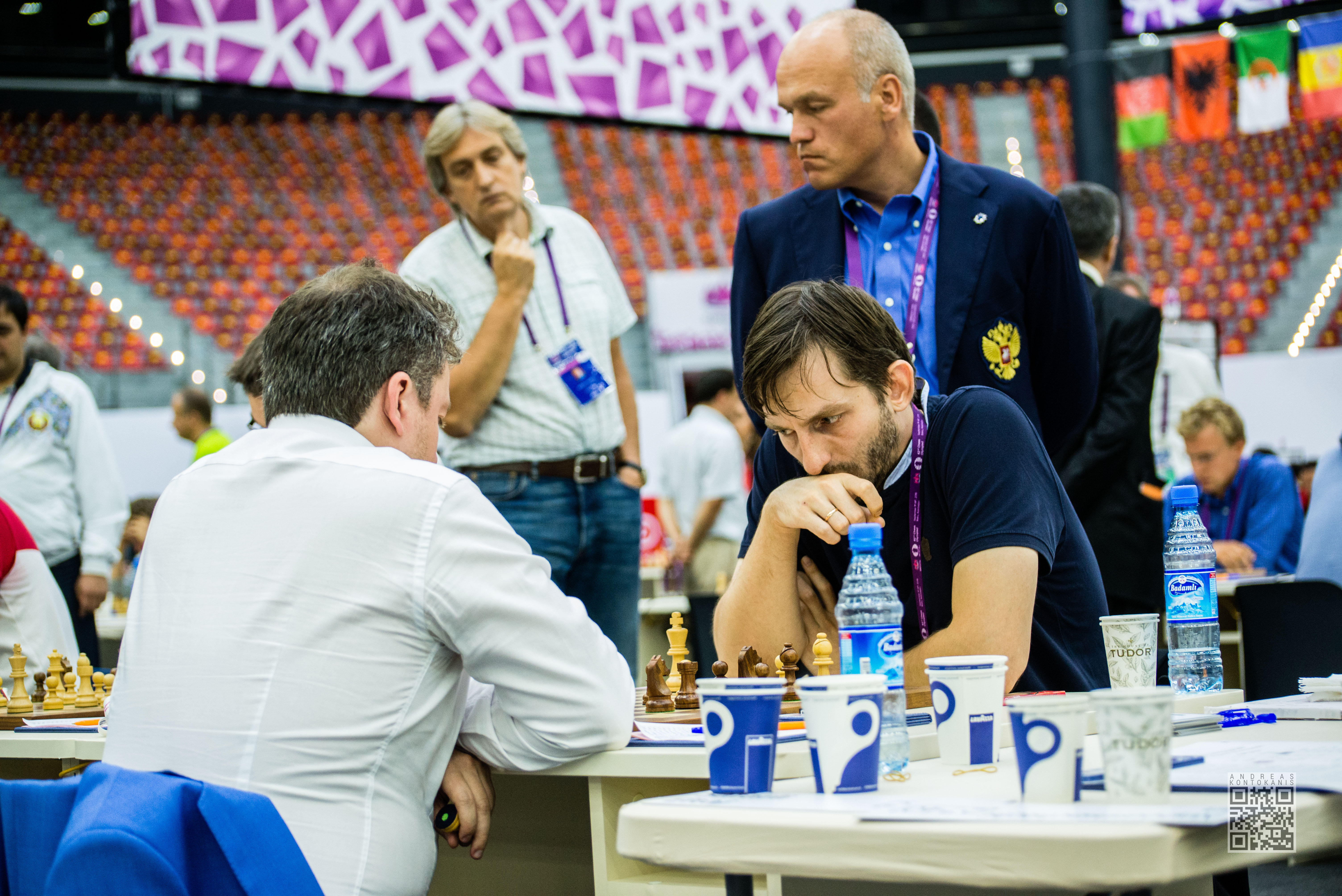 Grischuk Alexander and Filatov Andrey